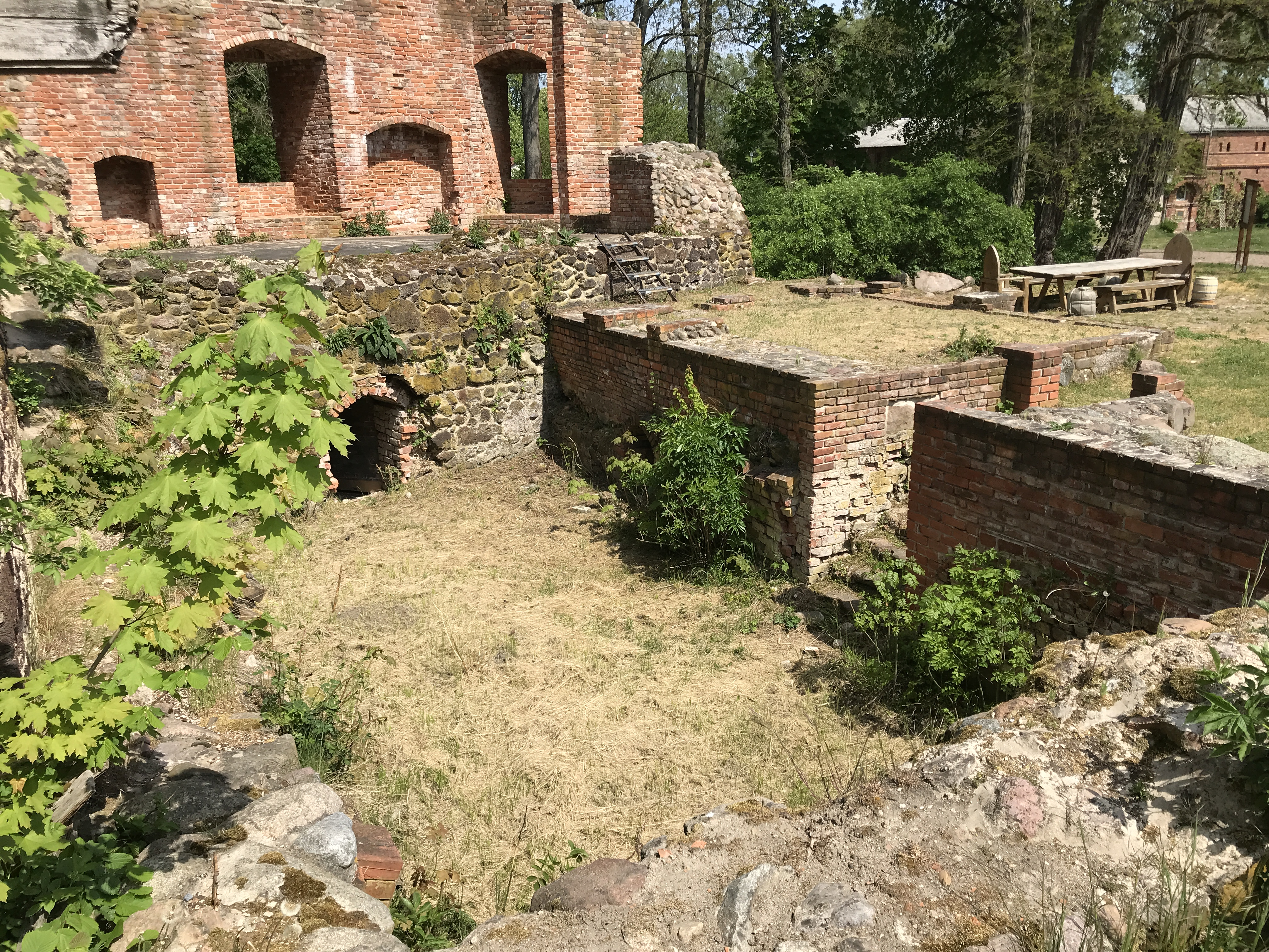 Ruine der mittelalterlichen ehemaligen Wasserburg in Bärwalde, Gemeinde Niederer Fläming